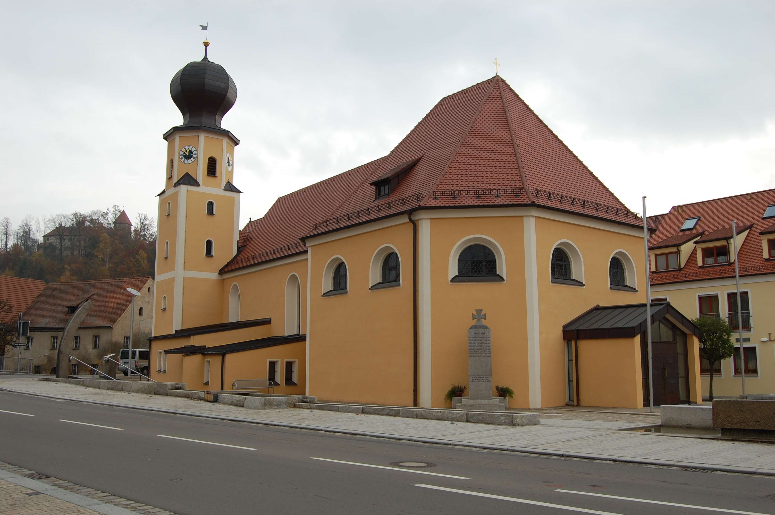 Wernberg-Köblitz, Pfarrkirche St. Anna